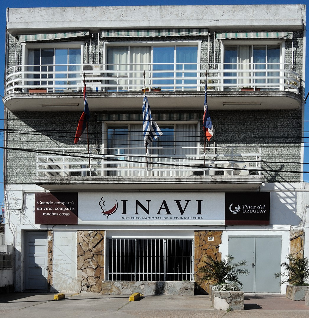 Fachada del INAVI en Las Piedras, Canelones, Uruguay.